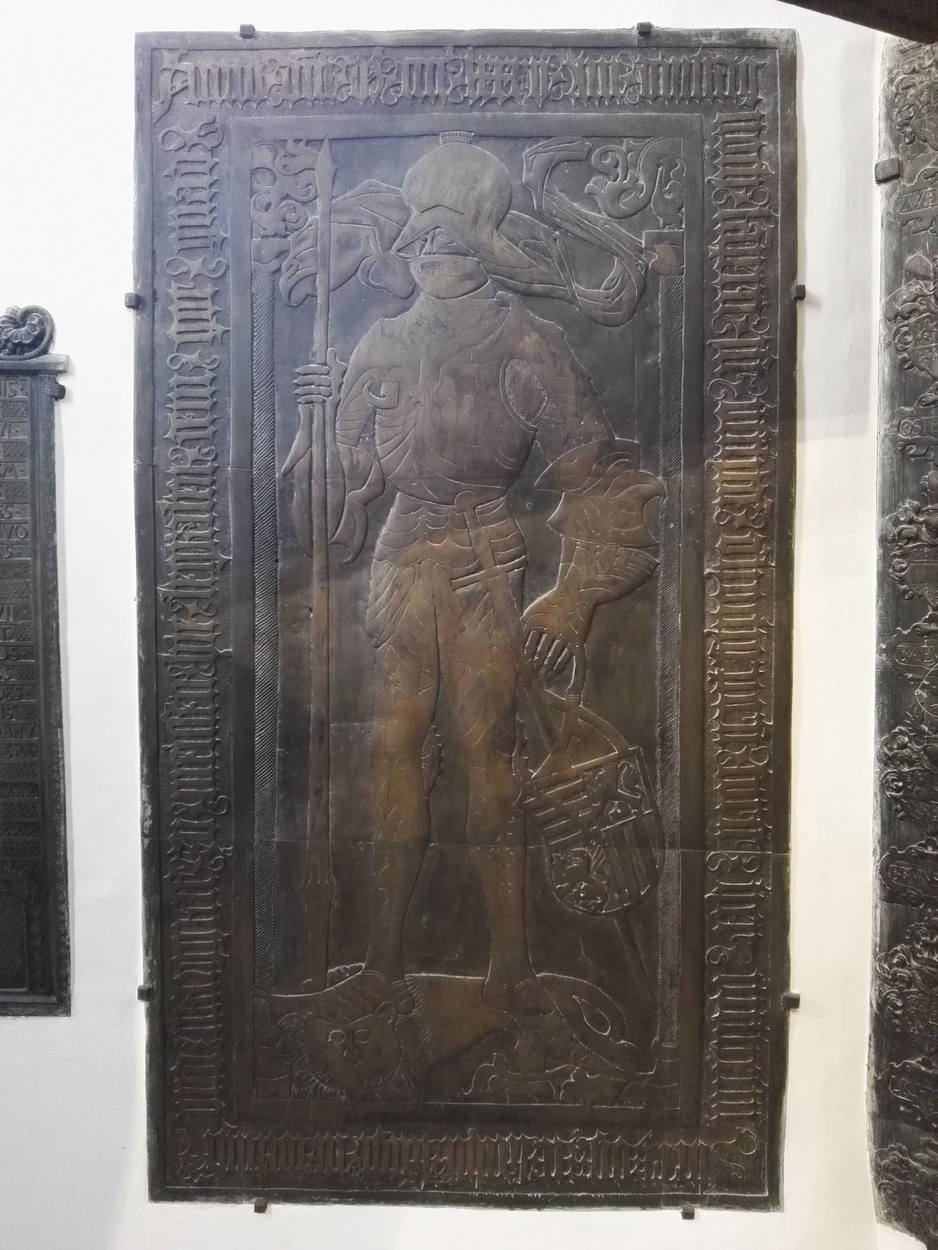 Grabplatte von Wilhelm III. der Tapfere von Sachsen in der Herderkirche in Weimar